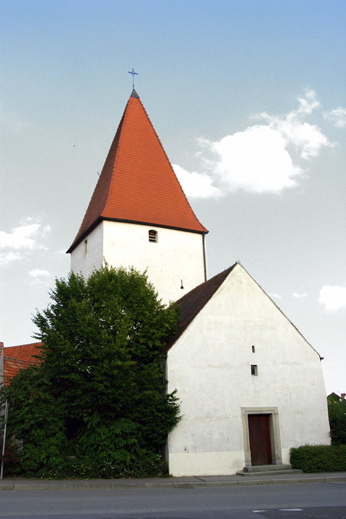 Filialkirche von Schwarzenfeld St. Stephanus in Stulln